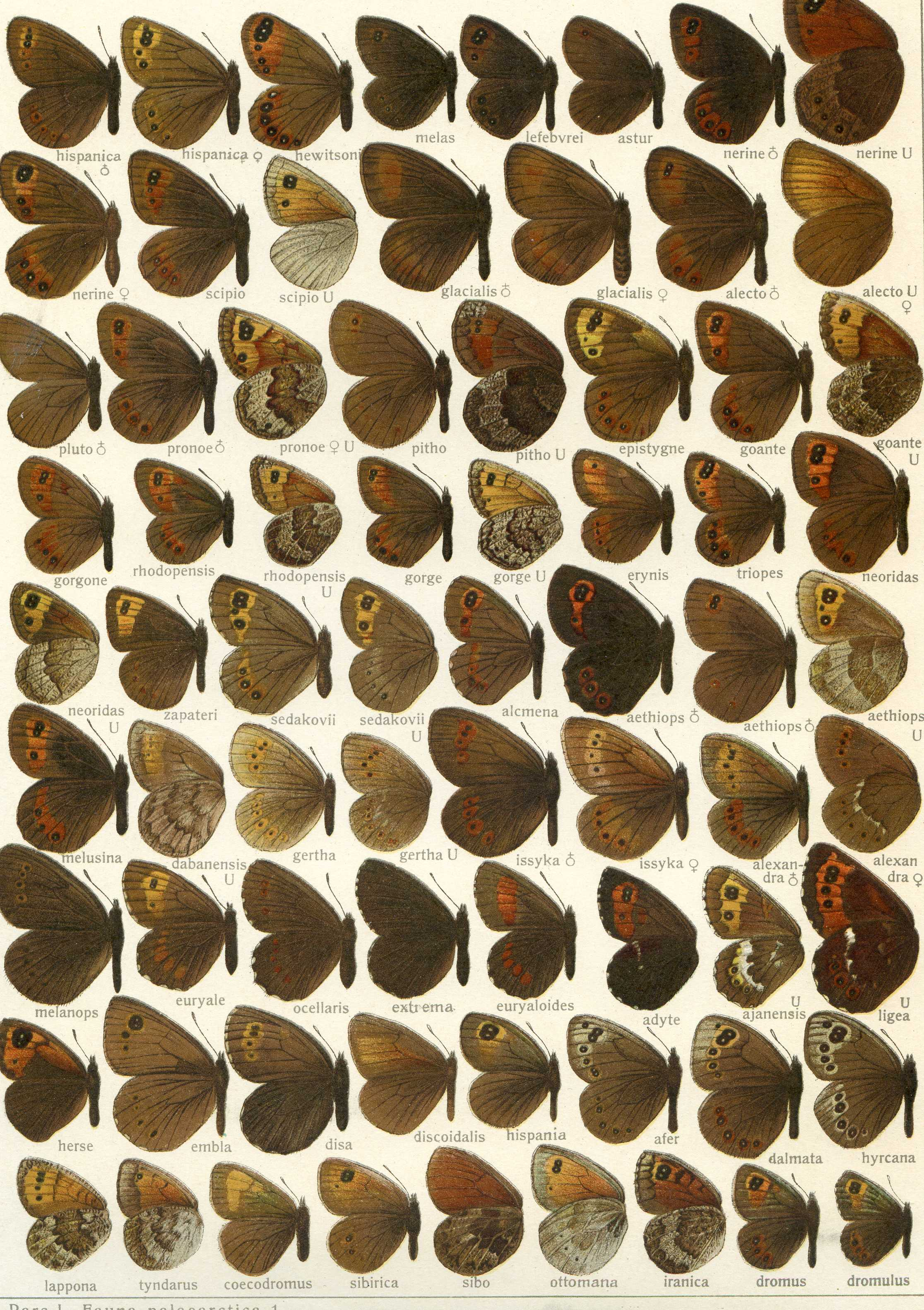 Description= Plate from Seitz, A. Ed., 1900-1909 Die Großschmetterlinge der Erde, Verlag Alfred Kernen, Stuttgart Band 4: Abt. 1, Die Großschmetterlinge des palaearktischen Faunengebietes, Die spannerartigen Nachtfalter (The Macrolepidoptera of the world : a systematic account of all the known Macrolepidoptera) Band 1: Abt. 1, Die Großschmetterlinge des palaearktischen Faunengebietes, Die palaearktischen Tagfalter. read text (in German) See The Global Lepidoptera Names Index for valid names